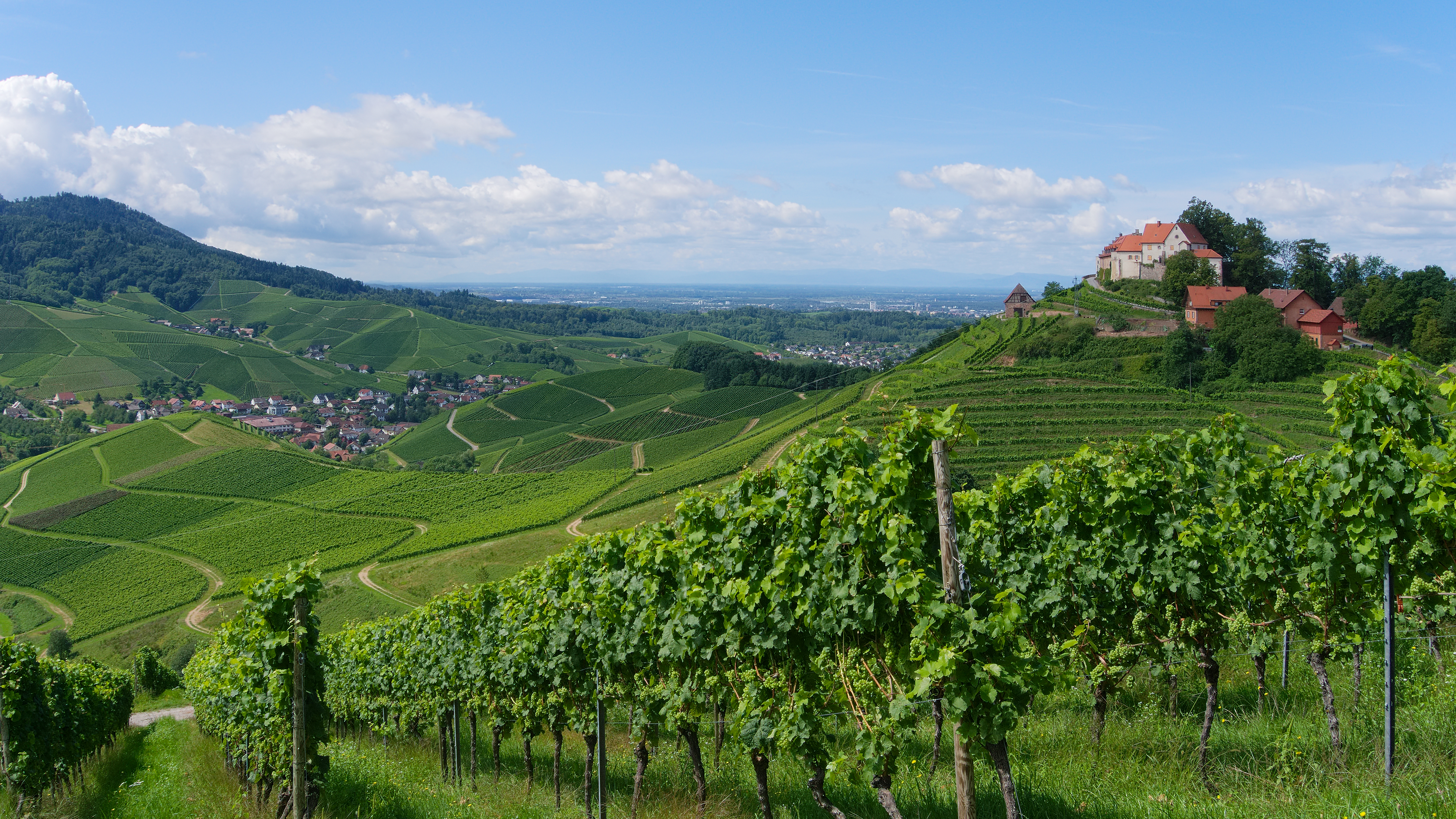 Weingut Schloss Staufenberg (Schwarzwald). Aufgenommen in Durbach, Baden-Württemberg, Deutschland.